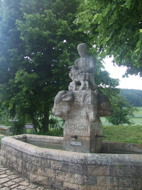 Brunnen in Gauingen, Gemeinde Zwiefalten, Landkreis Reutlingen